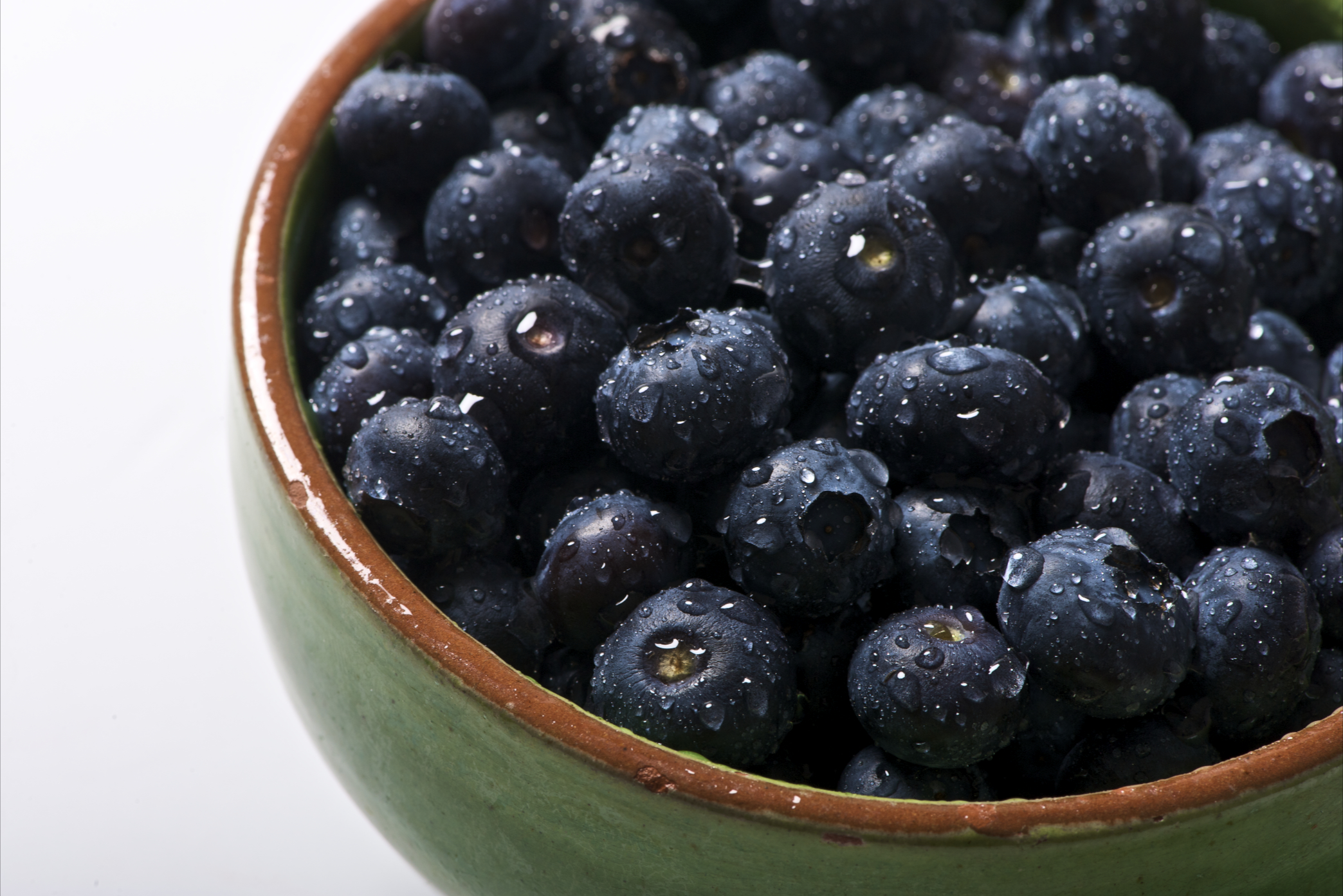 Blueberry